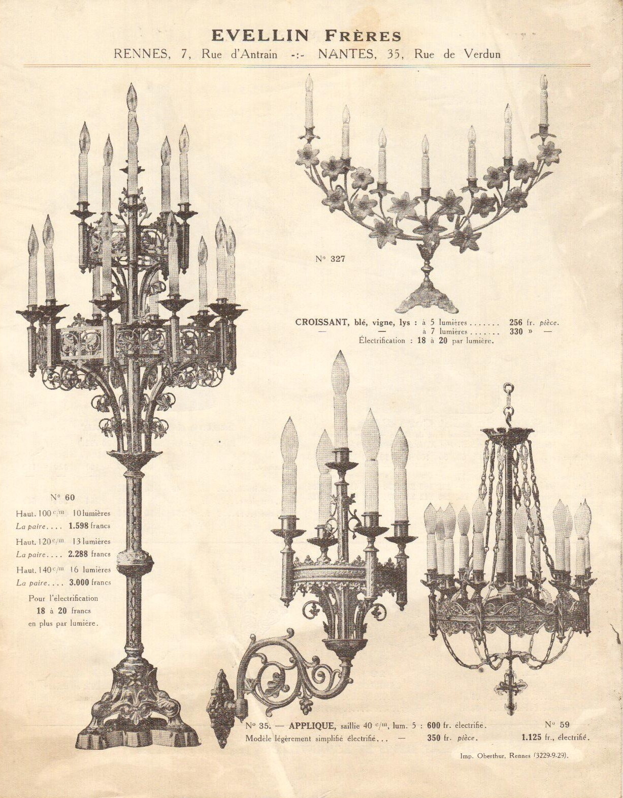 Extrait d'un catalogue de la maison Evellin, non daté (entre 1832 et 1924).